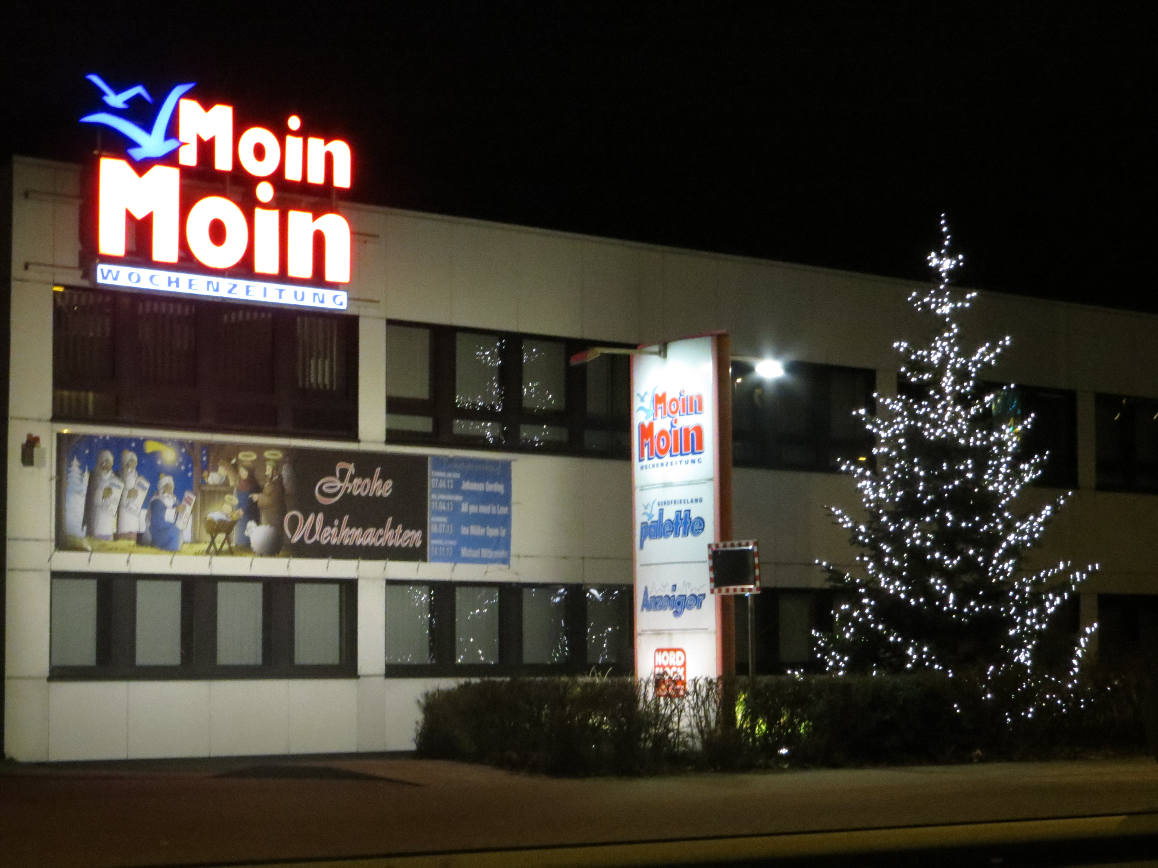 Das MoinMoin-Hauptgebäude, Am Friedenshügel 2 in Flensburg zur Weihnachtszeit, Bild 02